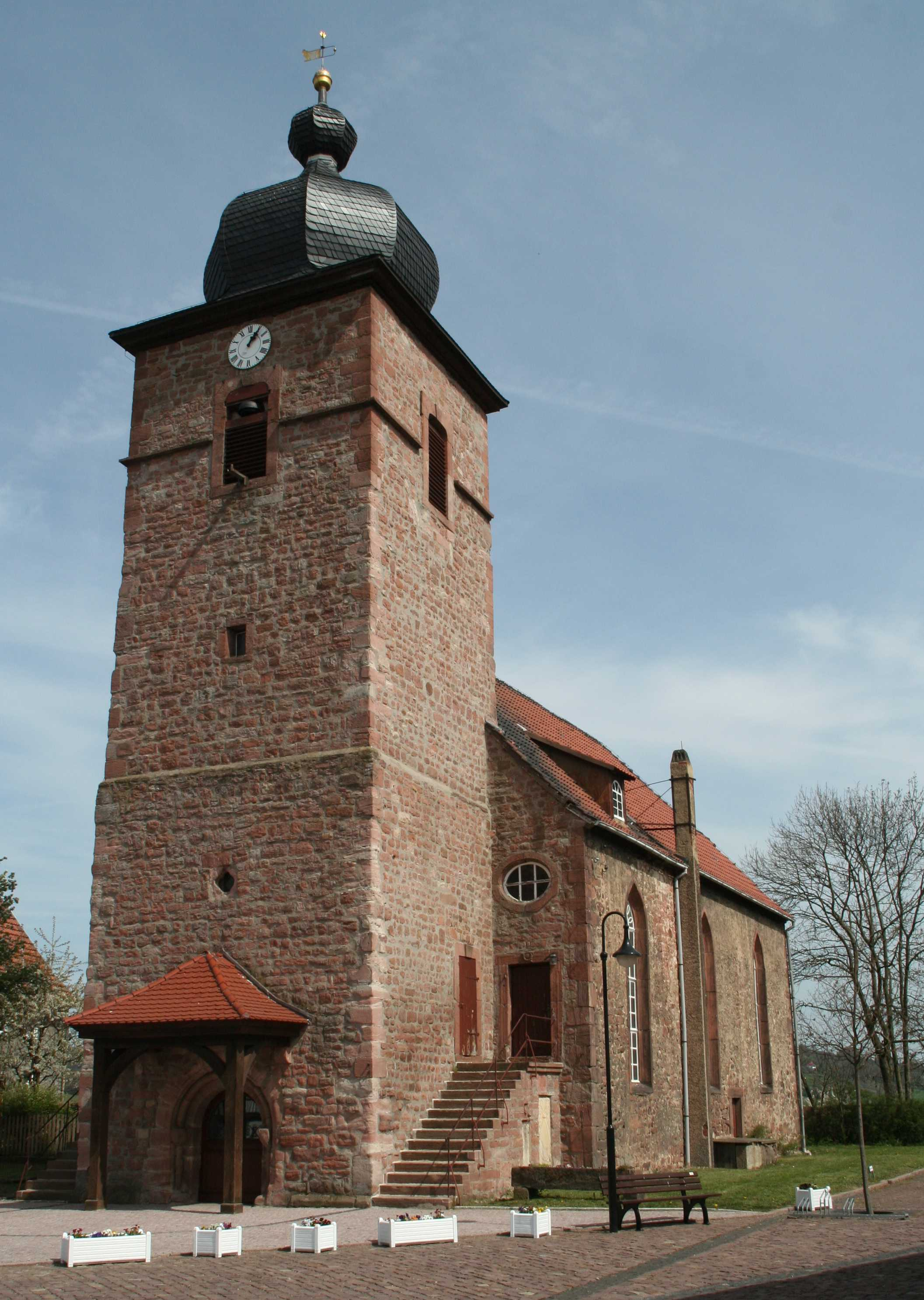 ev. Kirche Dorndorf evangelische Kirche in Dorndorf, Landkreis Wartburgkreis